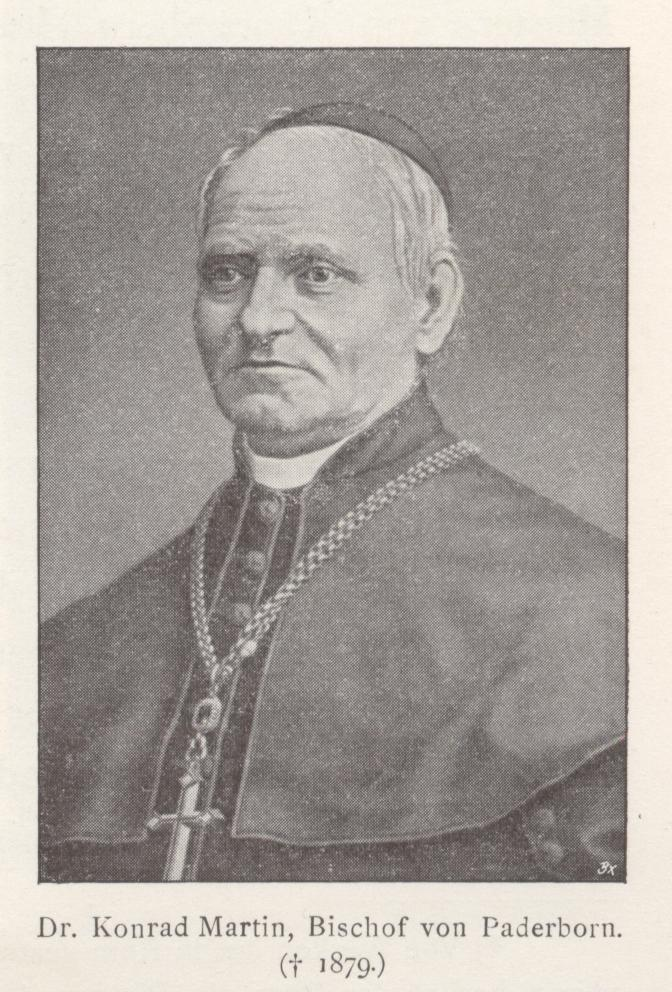 Bischof Dr. Konrad Martin, Paderborn